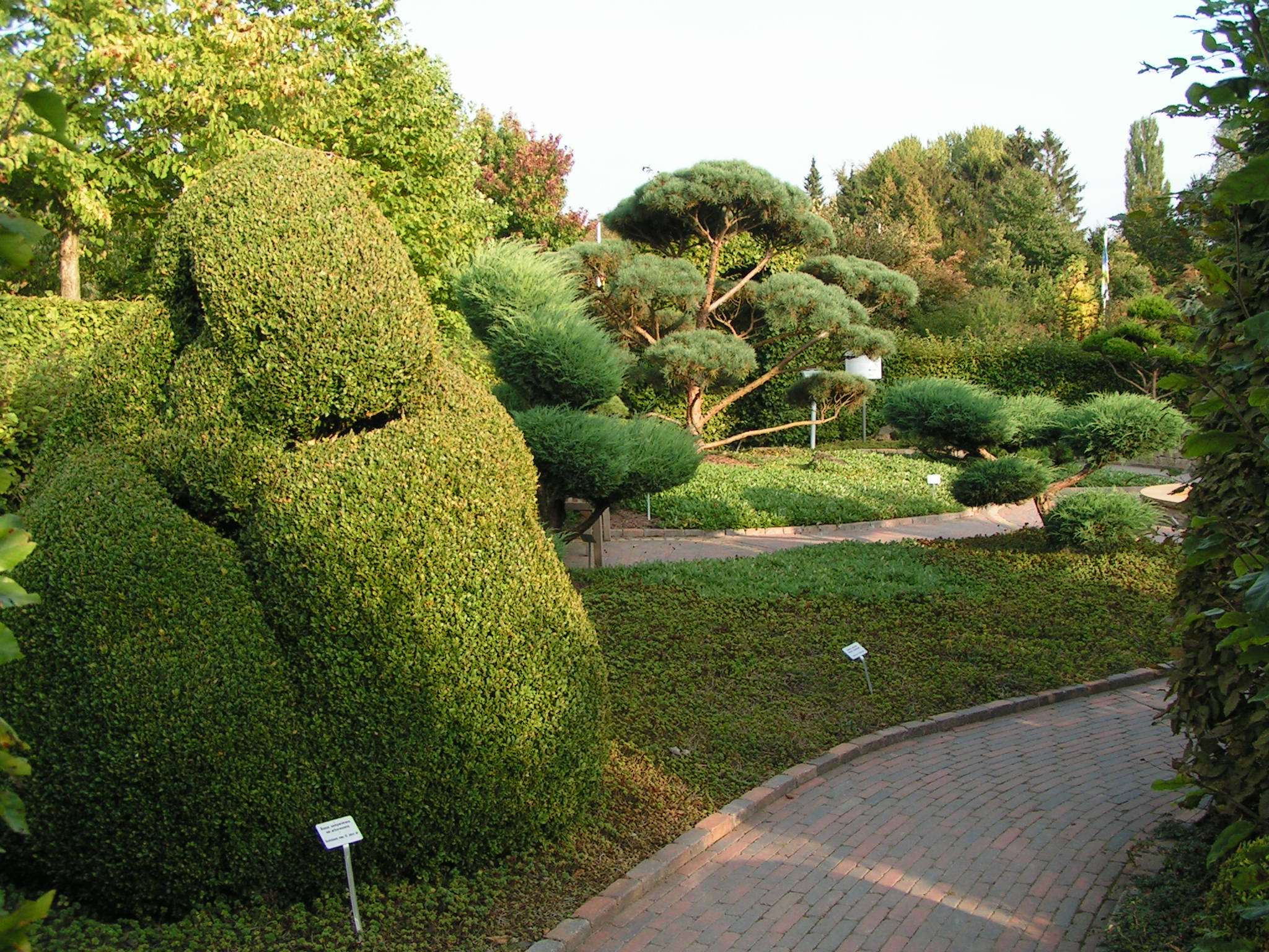 Ausgestellte Formschnitte im "Park der Gärten" bei Bad Zwischenahn